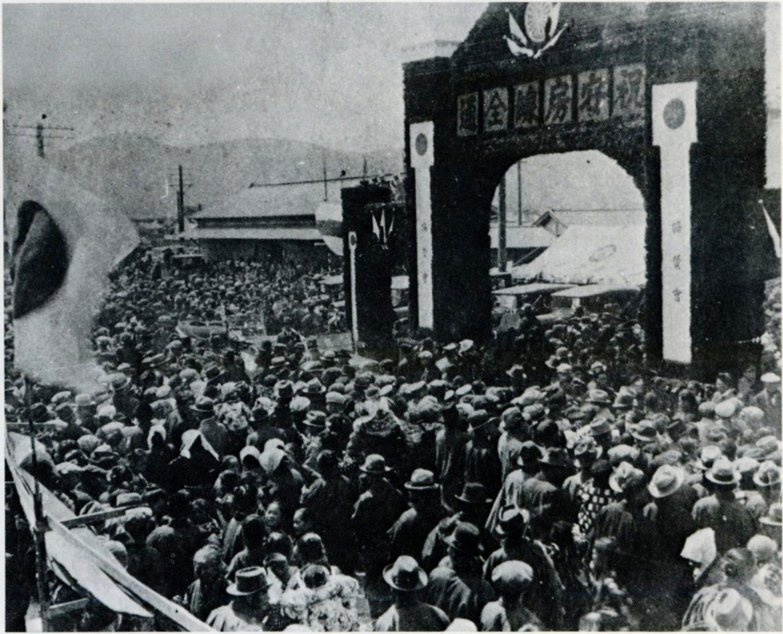 安房鴨川駅前における、房総東西線全通祝賀式。緑門には「祝安房線全通」の文字。出典に撮影日の記載は無い。